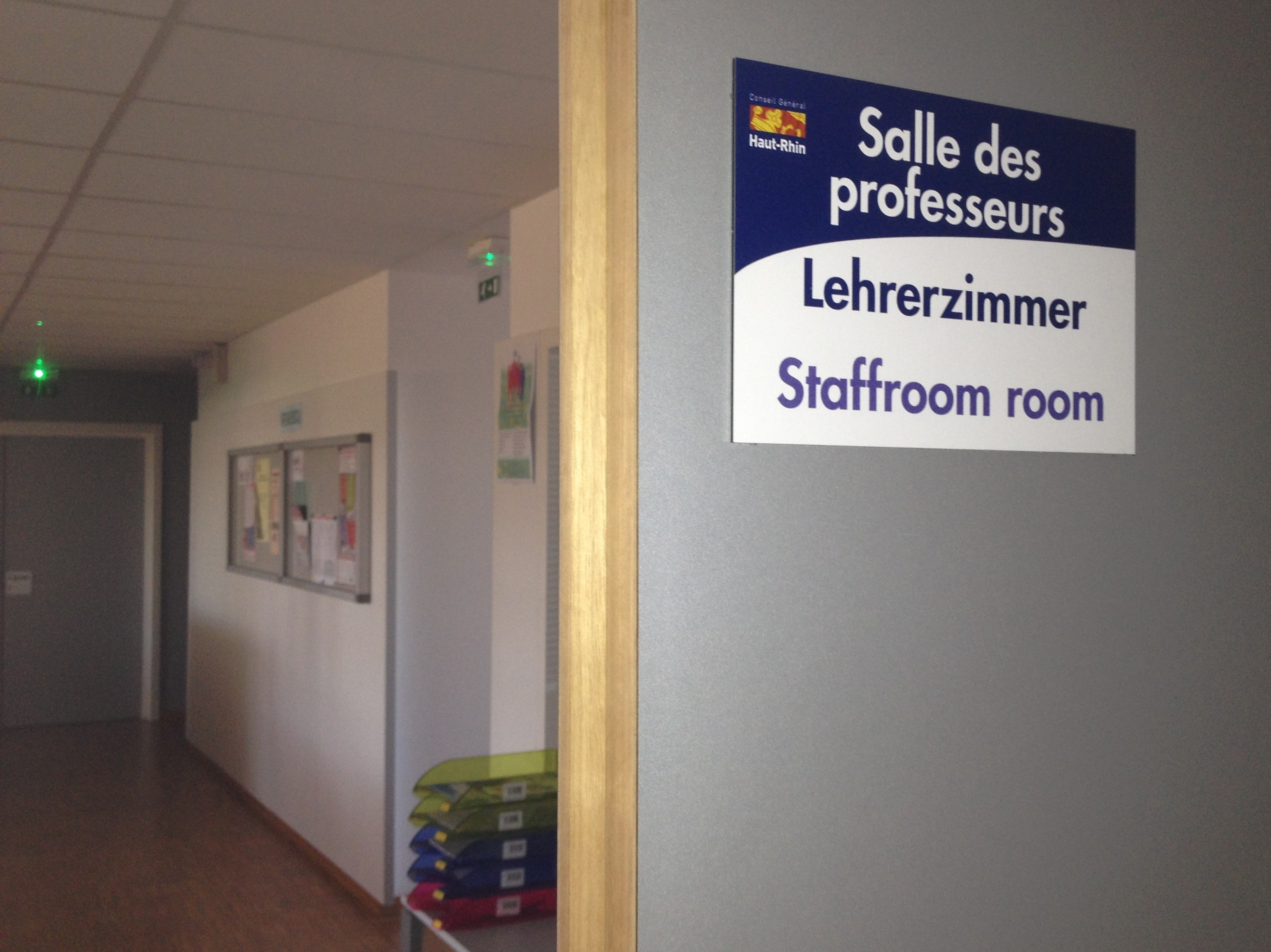 signaletique multilingue dans un collège d'Alsace (France)